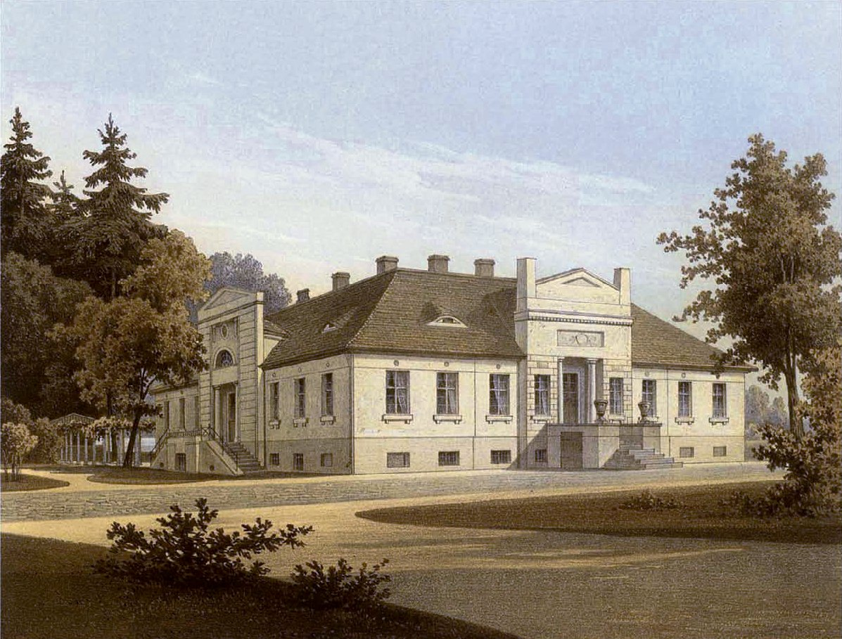 Gut Lübchen, Landkreis Guhrau